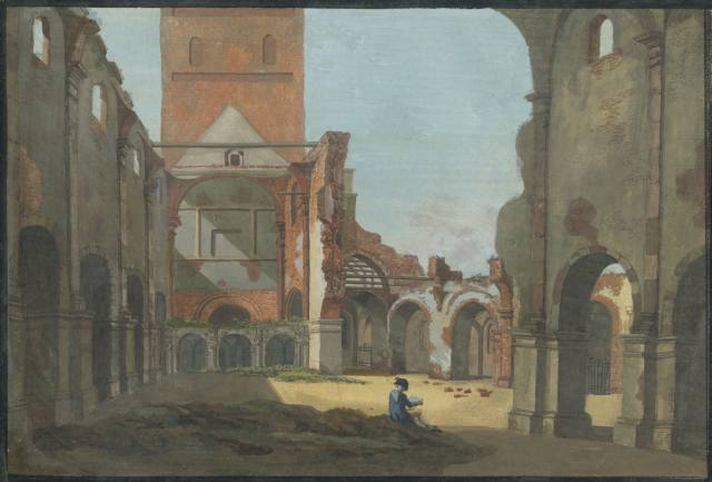 Poznań Collegiate by Alberti